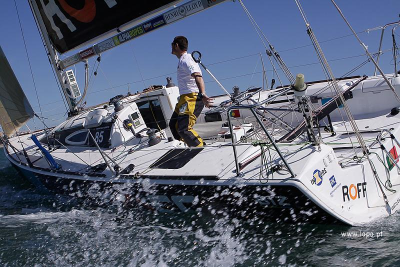 LPZ 20120416 0006